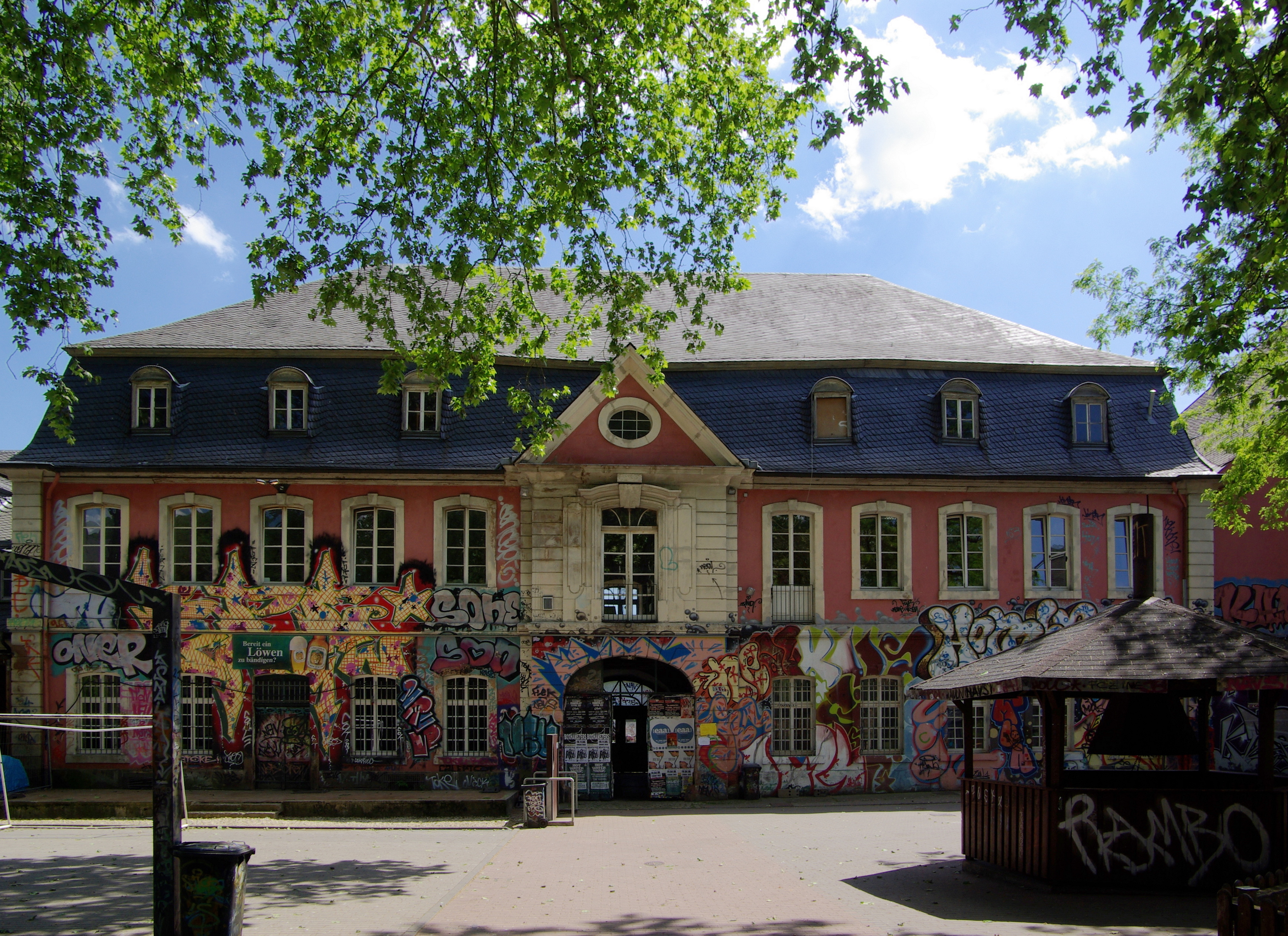 Trier, Zurmaiener Straße 114: sogenanntes Exzellenzhaus; ehemaliges Wirtschaftsgebäude der Benediktinerabtei St. Maria ad Martyres; Dreiflügelanlage, zweite Hälfte des 18. Jahrhunderts, Aufstockung des Südflügels 1875; Gartenmauer mit drei Pavillons, Gartenabschlussmauer mit Eingangstor